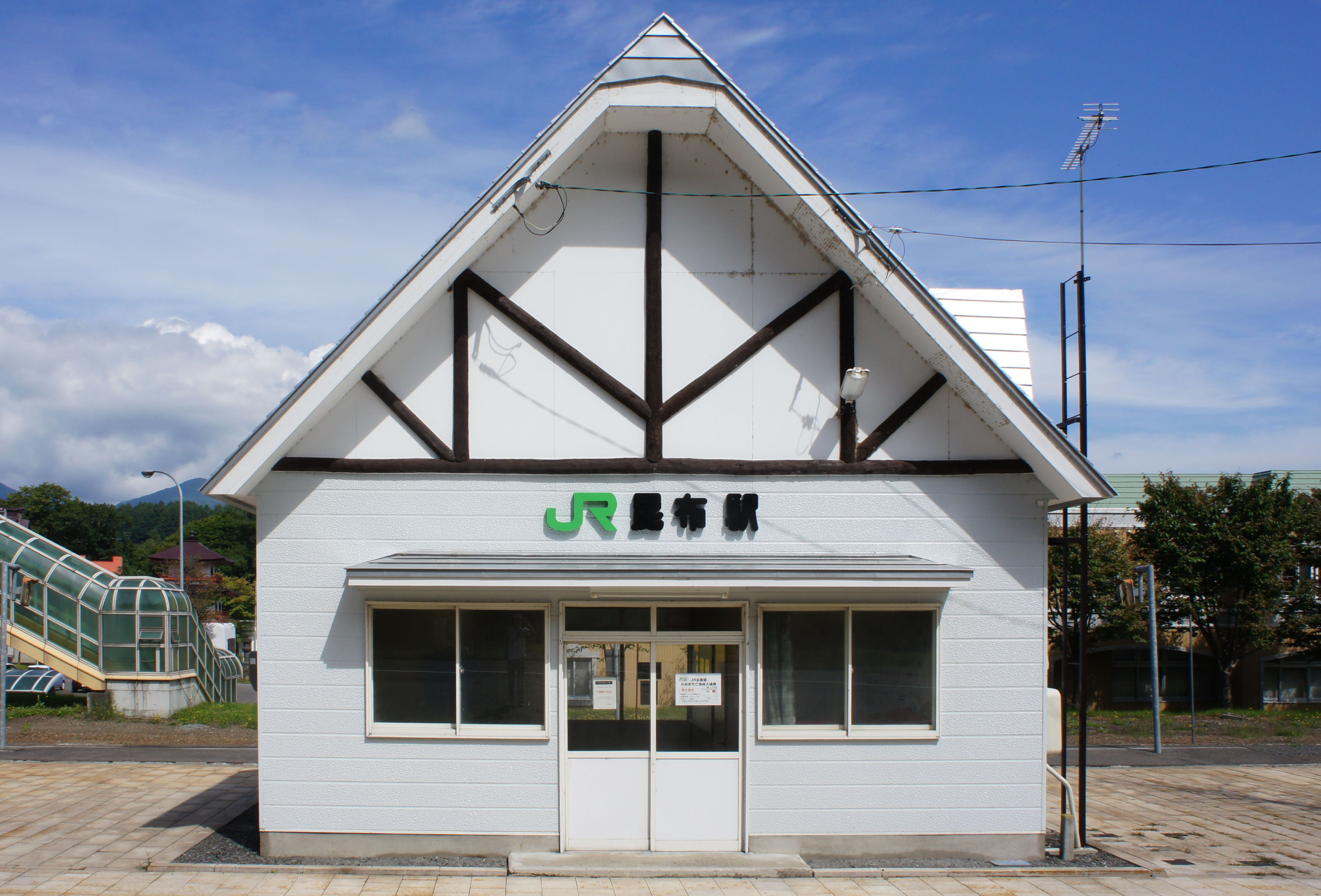 JR函館本線・昆布駅の駅舎 Sony NEX-3